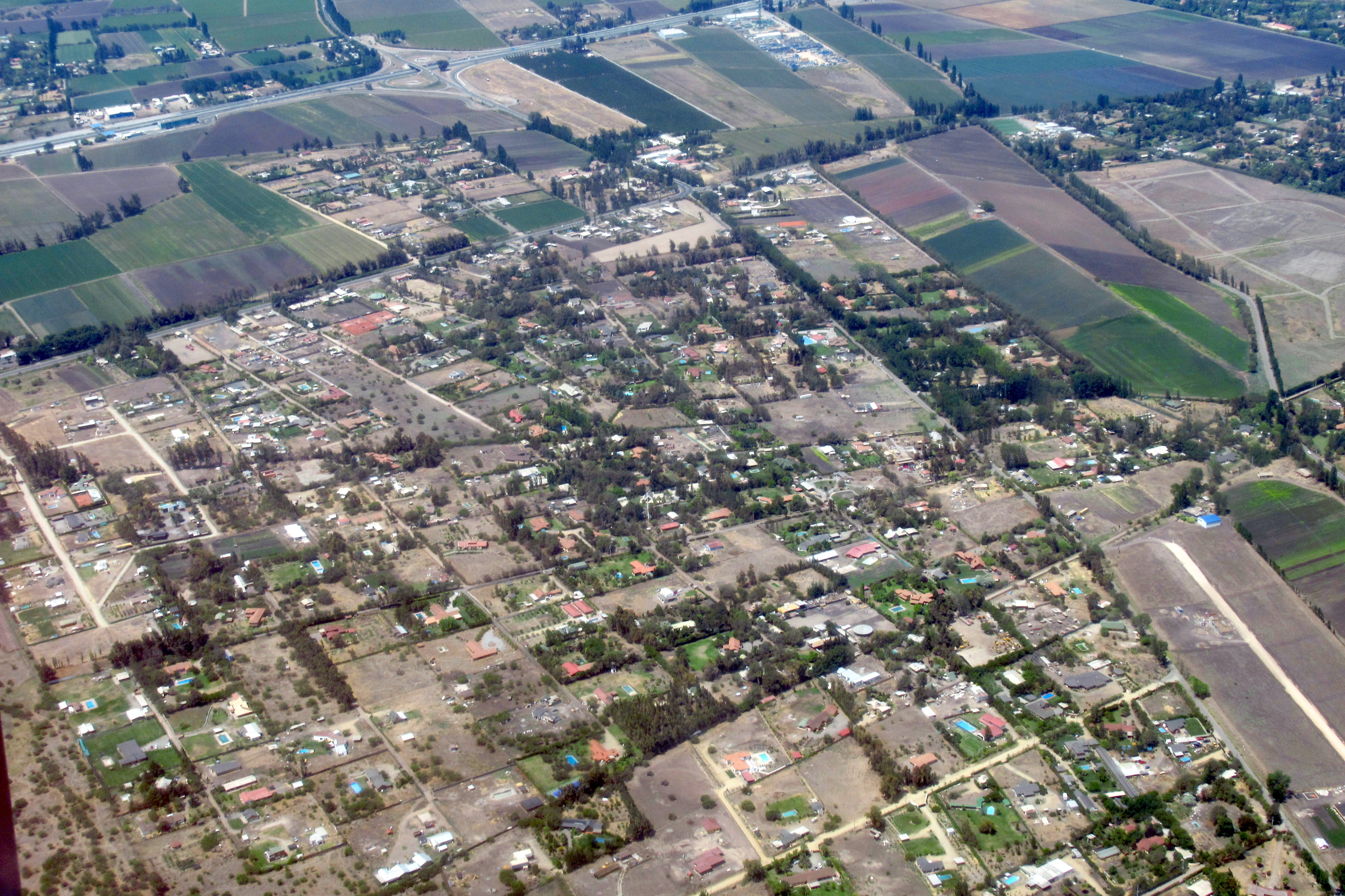 Parcelación en Batuco, comuna de Lampa. Altitud de vuelo 1280 m s.n.m. aproximadamente.